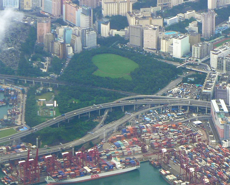 Kwai Chung Park Overview